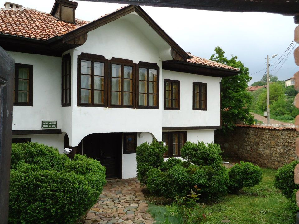 Стойова къща